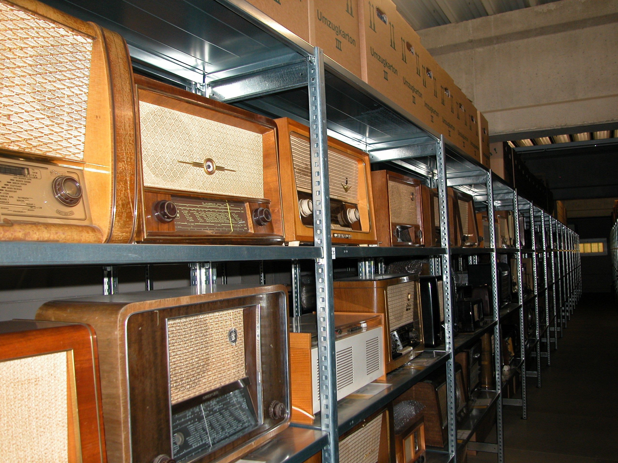 Lagerung von Radios im Depot - Hier als Schaudepot eingerichtet, daher ohne Staubschutz